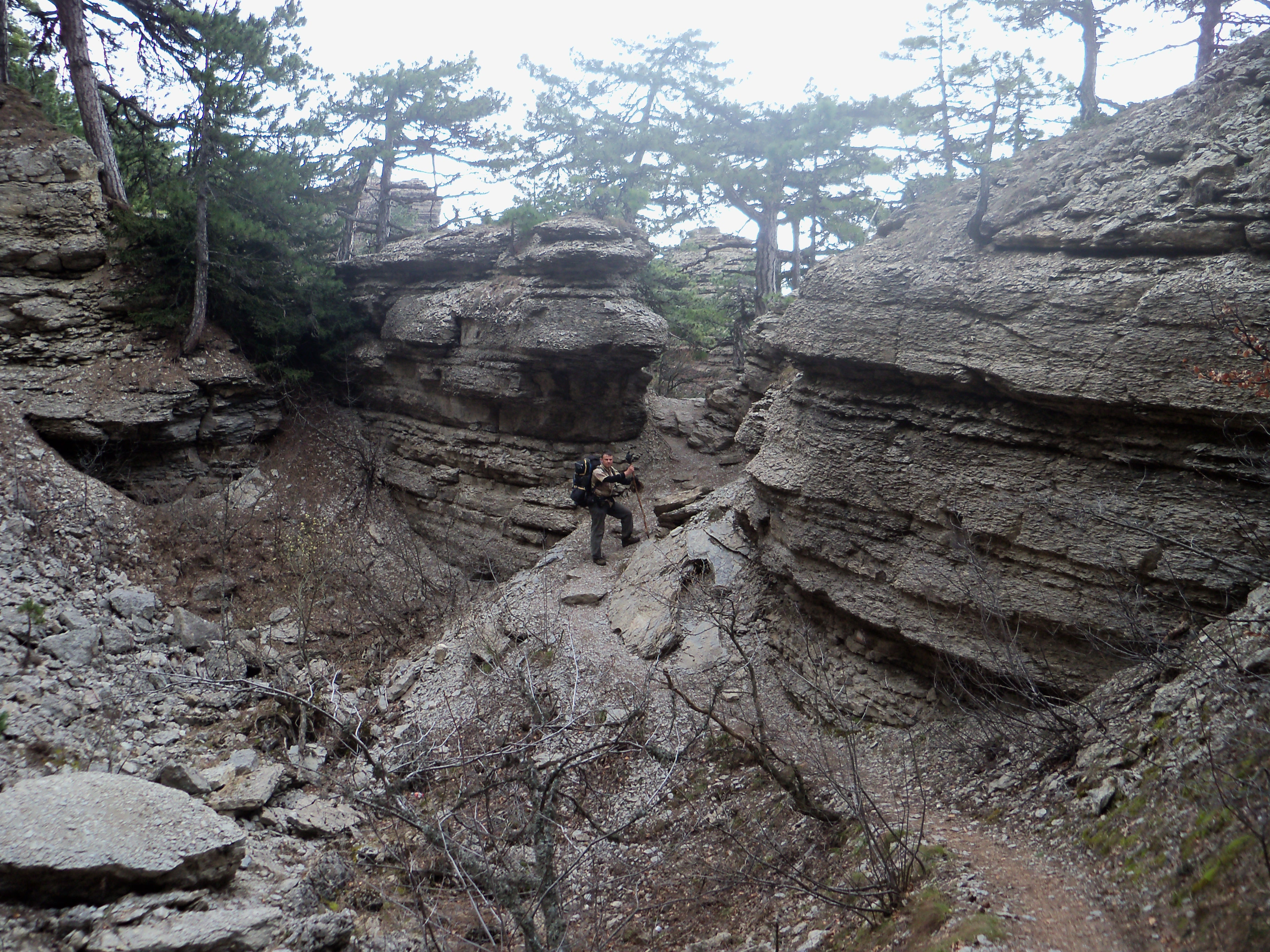 Скелі_Таракташ._Крим: Фото